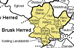 Brusk Herred, Vejle Amt, Denmark